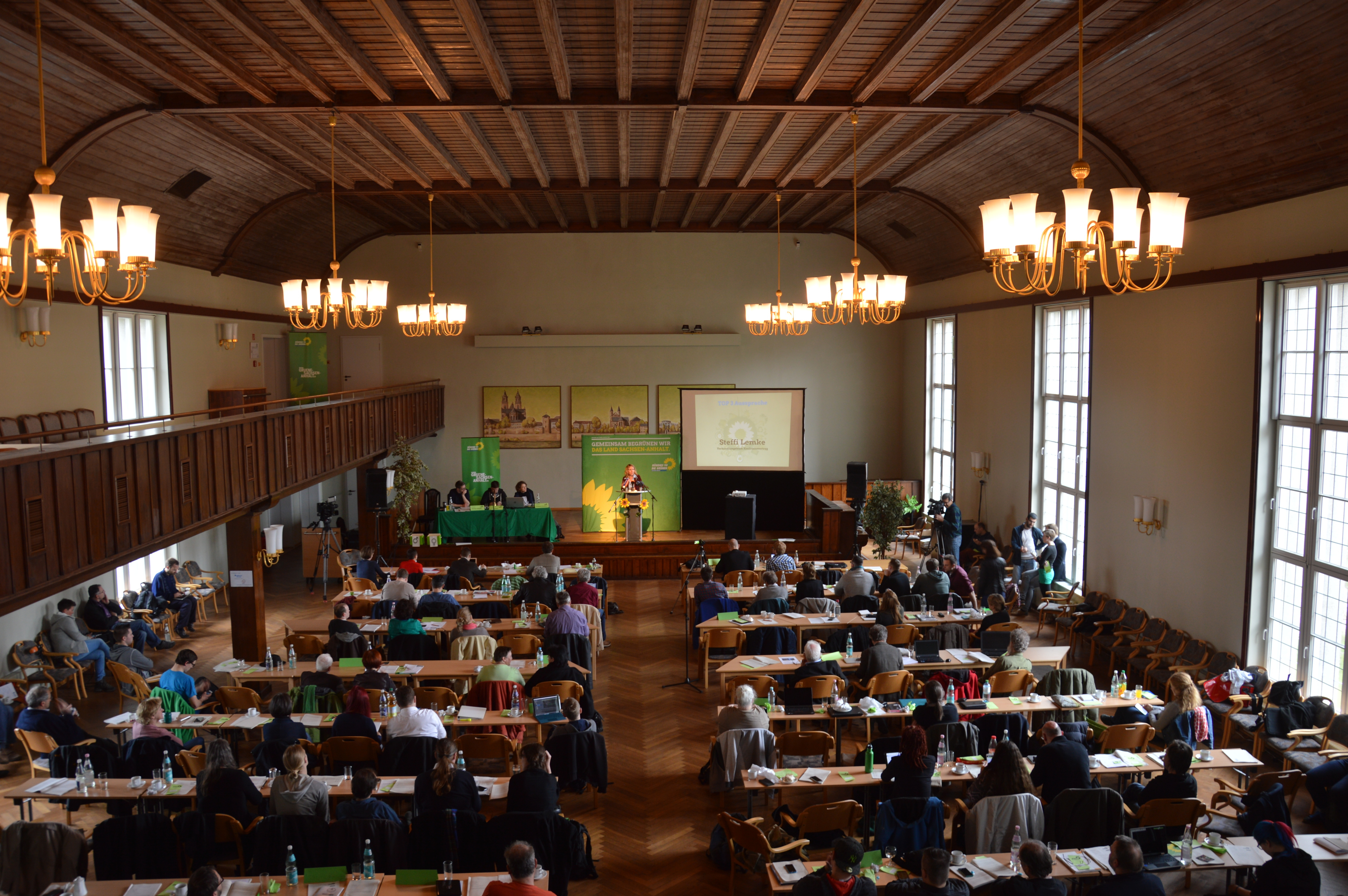 Otto-Kobin-Saal während eines Landesparteitags von Bündnis 90/Die Grünen am 23.4.2016, Rednerin Steffi Lemke